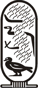 relief of the cartouche of king Hudjefa on the Saqqara table